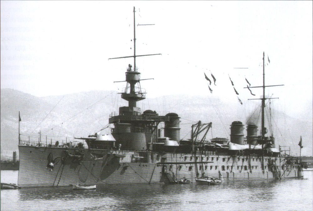 französischer Panzerkreuzer Leon Gametta. Versenkt von K.u.K. SM U-5